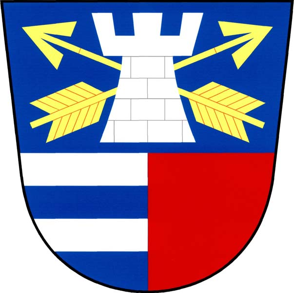 Znak obce Dražovice (okres Klatovy)